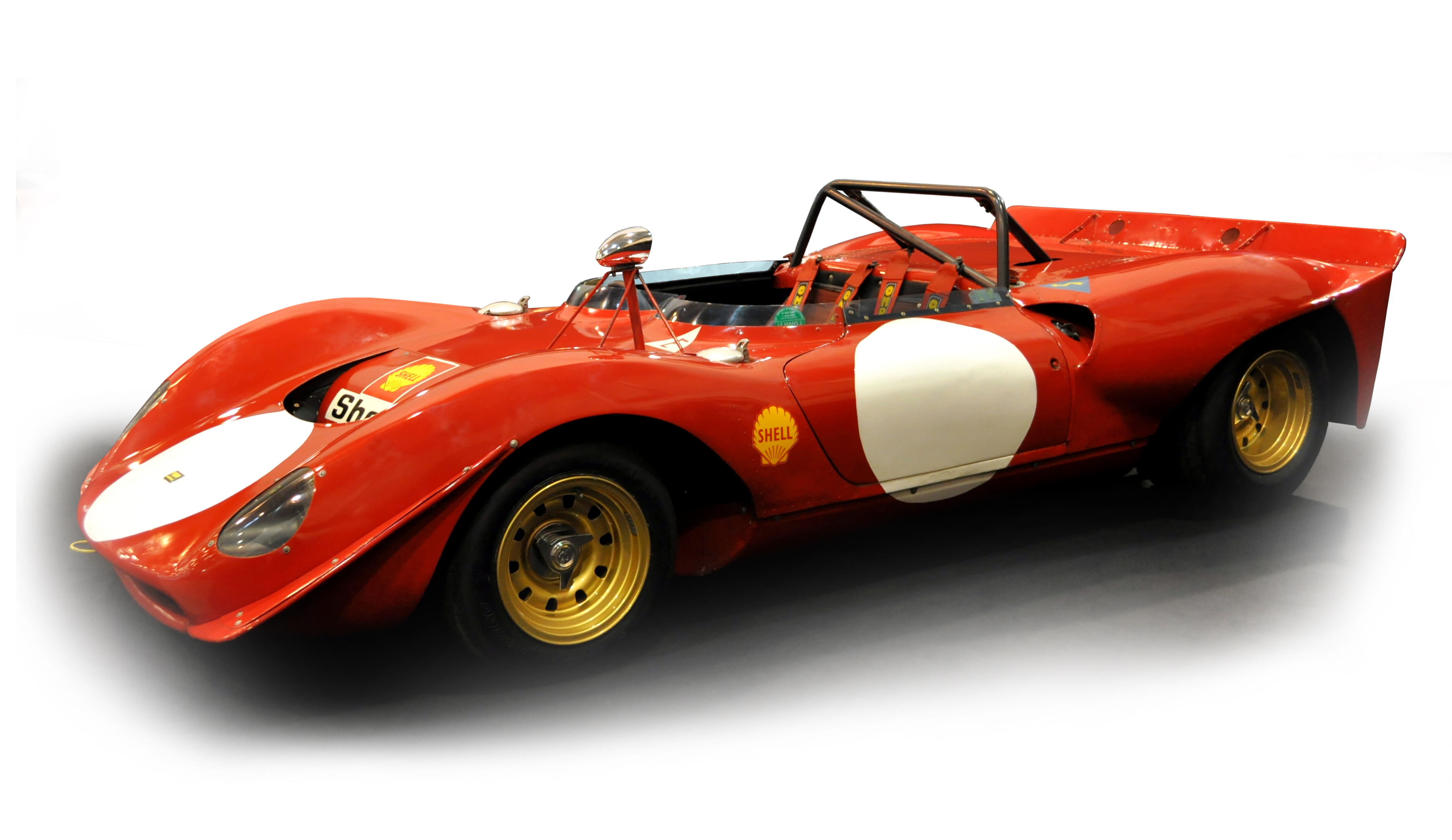 Ferrari Dino 206S (Chassis No. 018, 1966) auf der Technoclassica 2011 in Essen